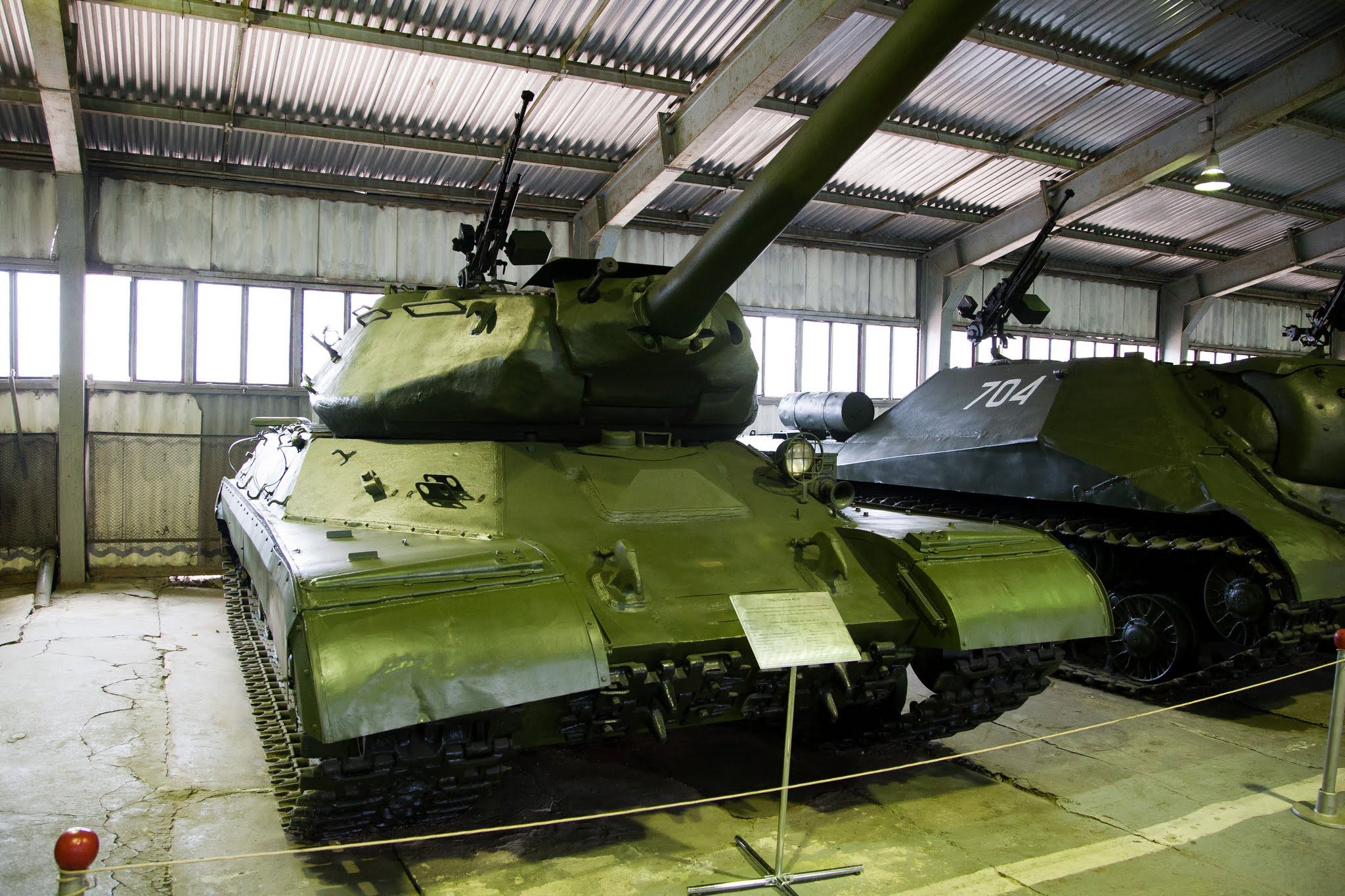 Танк ИС-4 в Бронетанковом музее г. Кубинка.